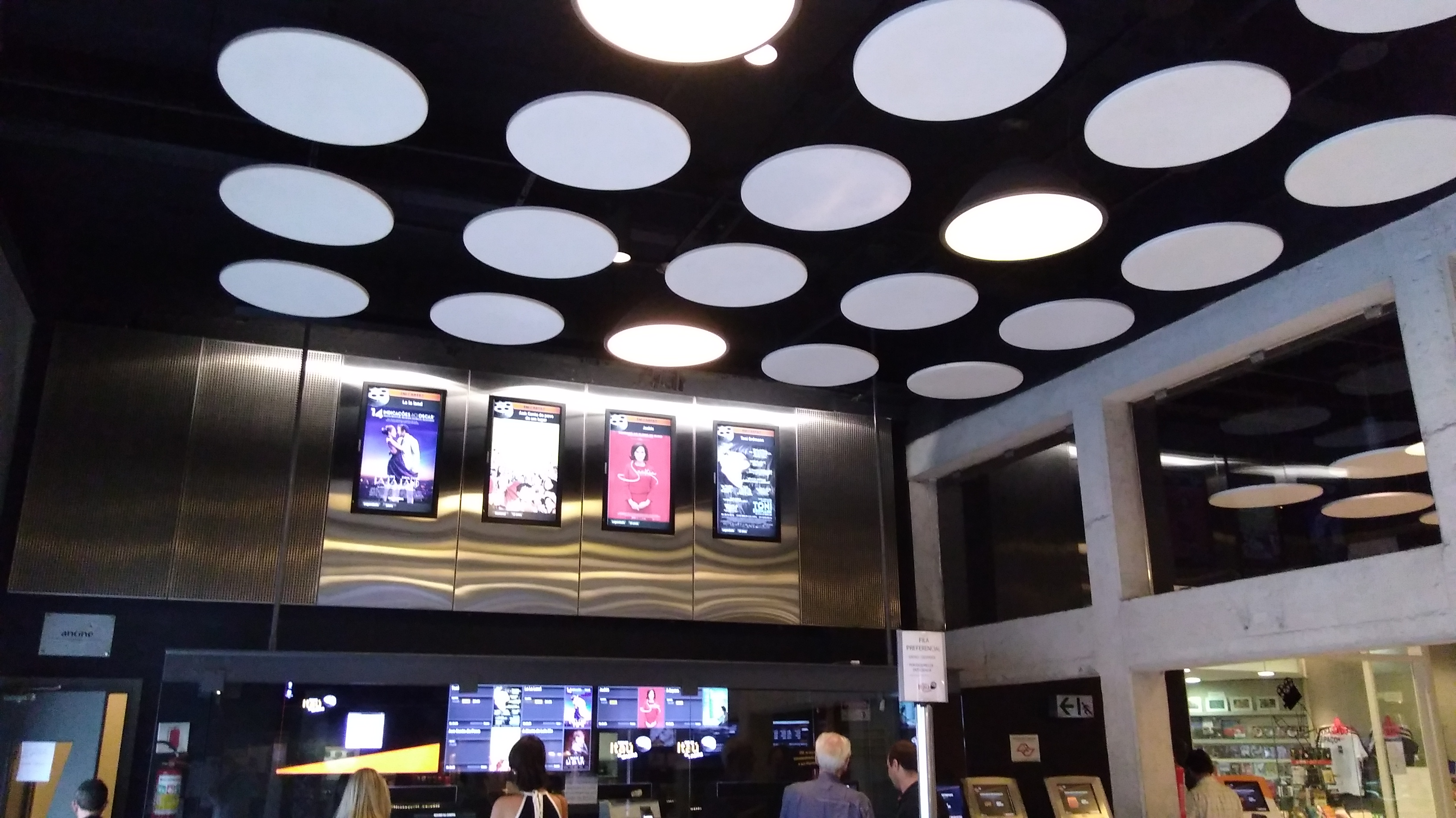 Decoração do teto do Espaço Itaú da Rua Augustas em São Paulo, SP